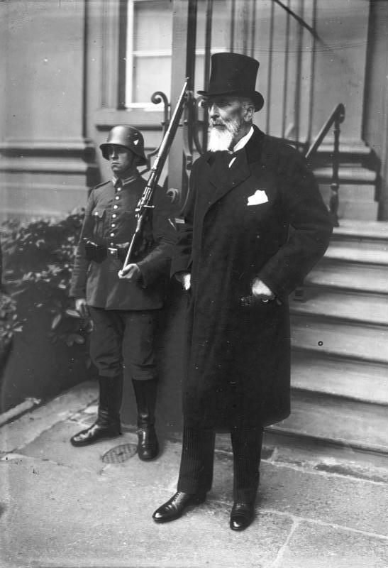 Der bekannte ungarische Staatsmann Graf Alvert Apponyi, welcher augenblicklich in Berlin weilt, wird im Planarsaal des Reichstages einen Vortrag über die dauernde Grundlage des Friedens halten. Graf Apponyi nach einem Besuch beim Reichspräsidenten von Hindenburg.